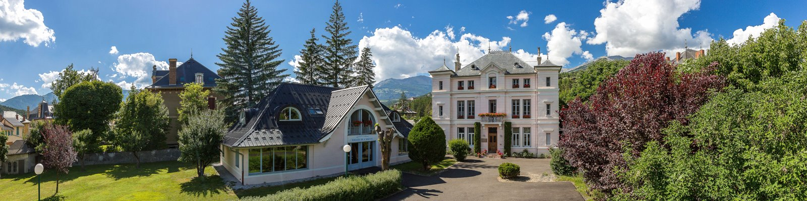 Vue de la Communauté de Communes Vallée de l'Ubaye